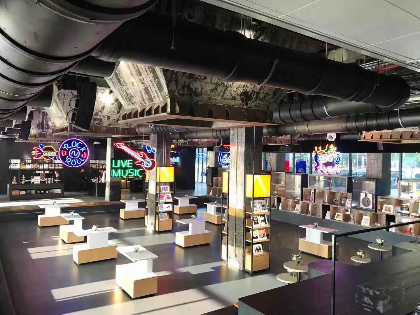 Modern Art Museum Shanghai 1F Lobby shot in Nov 2019 in Shanghai